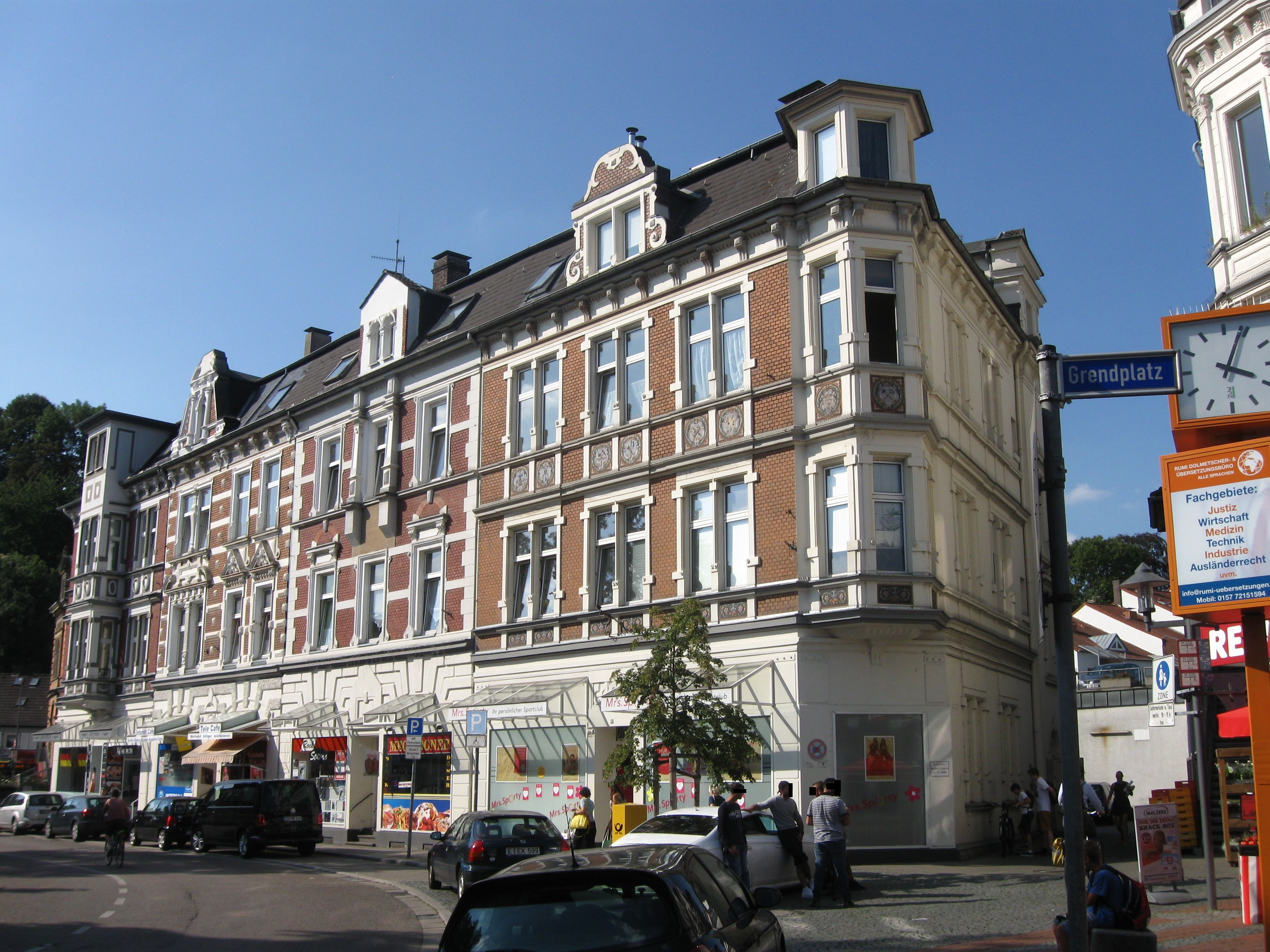 Wohn- und Geschäftshäuser am Grendplatz in Essen-Steele, teilweise unter Denkmalschutz